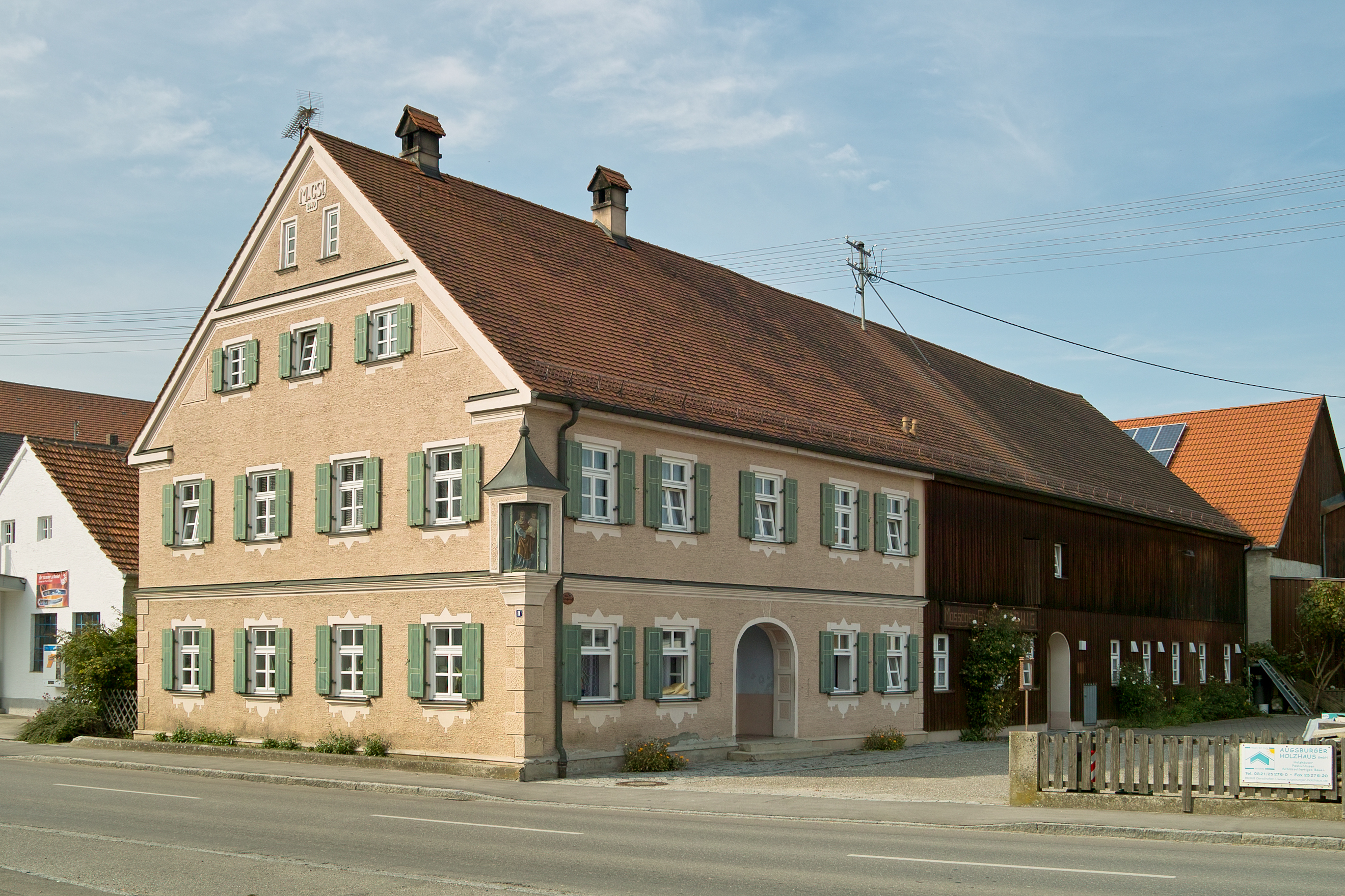 Bauernhaus in Gablingen Hauptstraße 11 aus dem Jahre 1910.